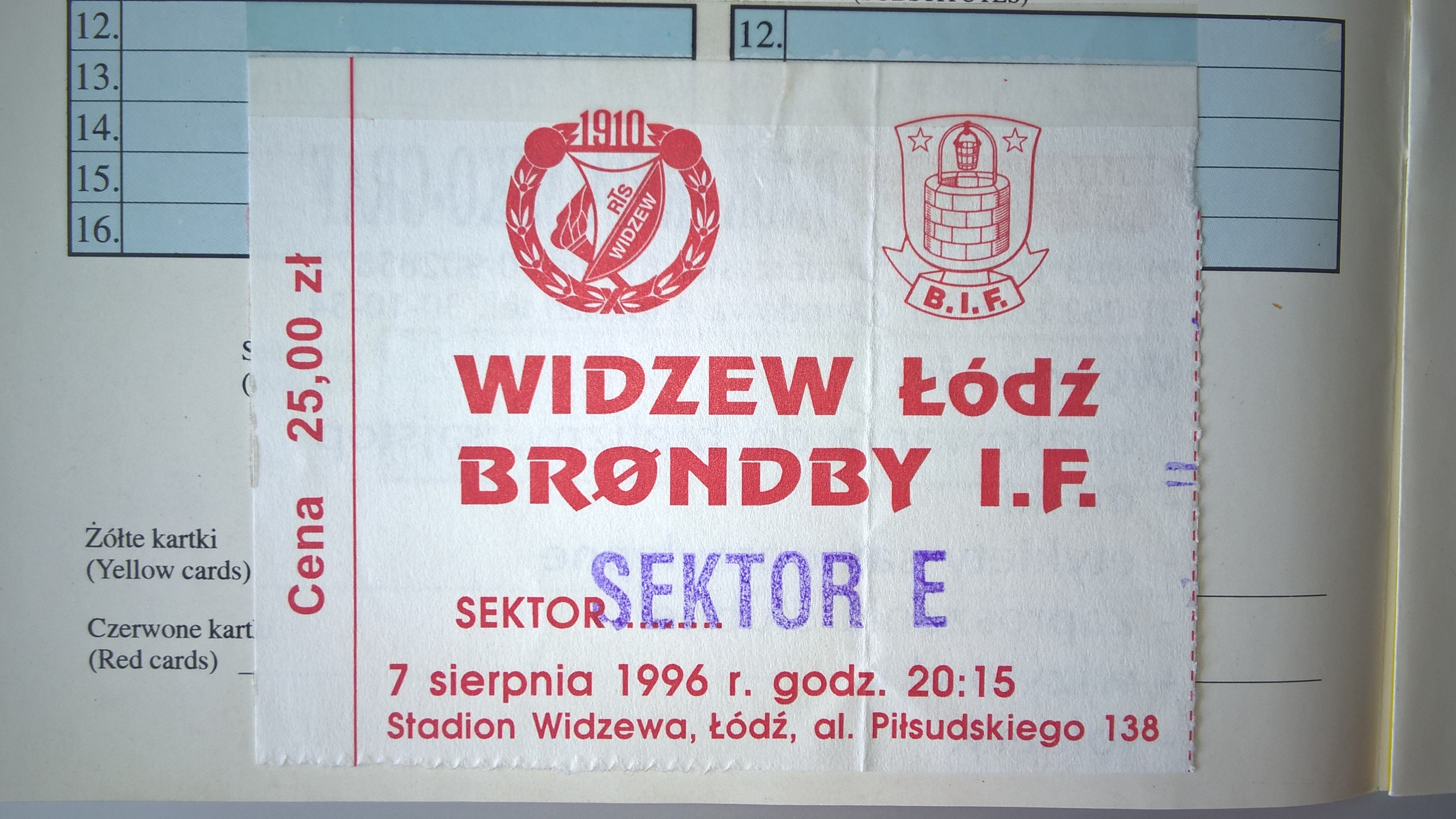 Bilet na mecz eliminacyjny Ligi Mistrzów na stadionie Widzewa: Widzew Łódź - Brøndby Kopenhaga (07.08.1996)